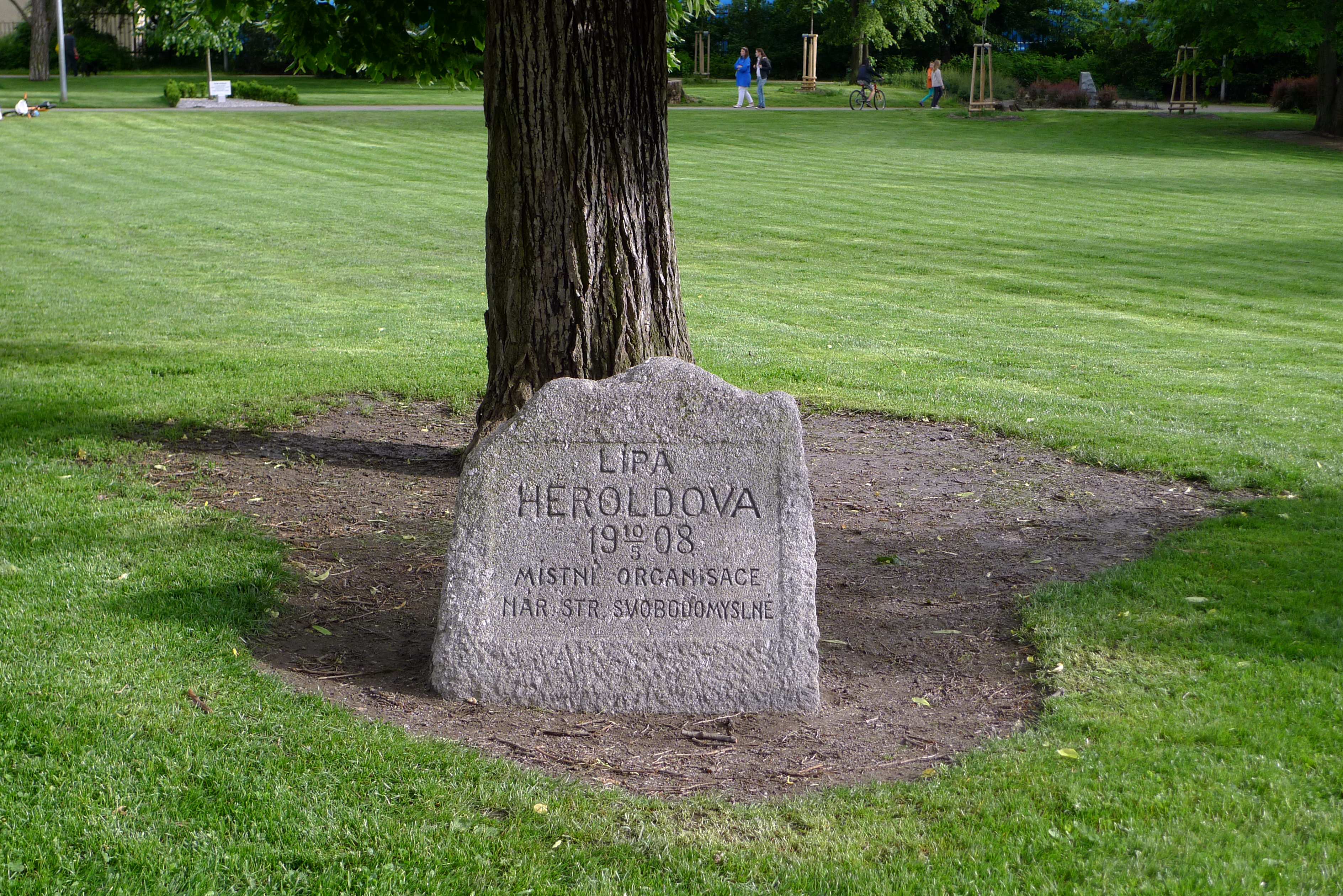 Heroldovy sady v Praze 10-Vršovicích - Heroldova lípa.